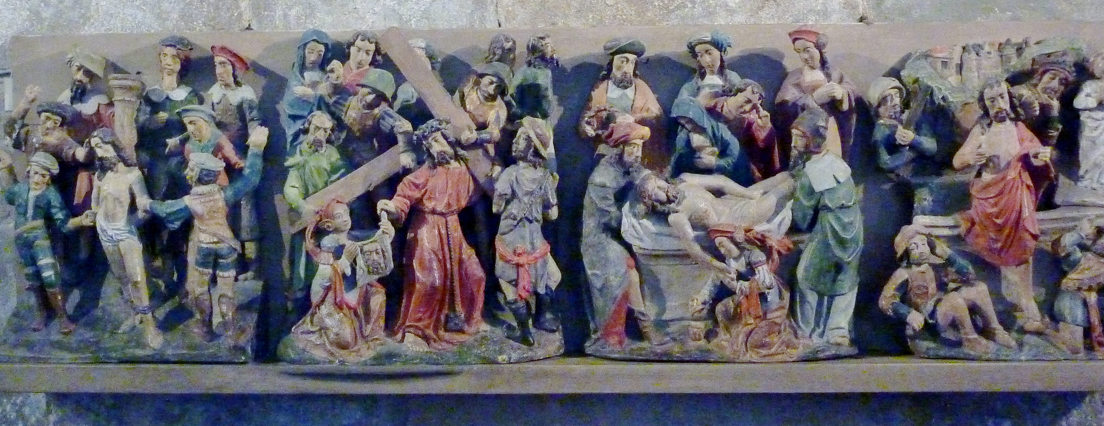 Basilique Notre-Dame de Bon-Secours de Guingamp : chemin de croix.